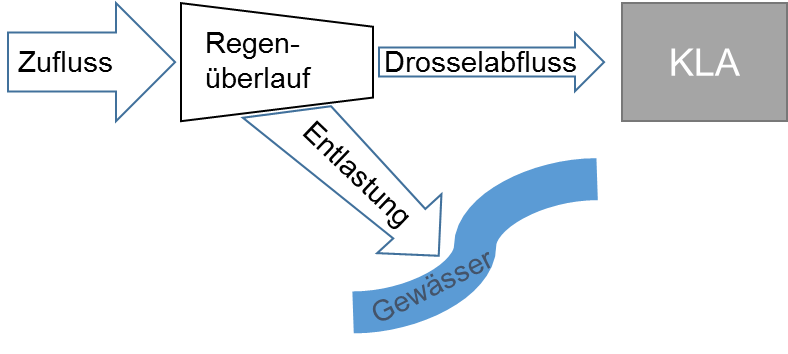 Ein Regenüberlauf leitet einen Teil des Zuflusses als Drosselabfluss zur Kläranlage weiter. Der andere Teil des Zuflusses wird zur Entlastung der Kläranlage in das Gewässer eingeleitet.